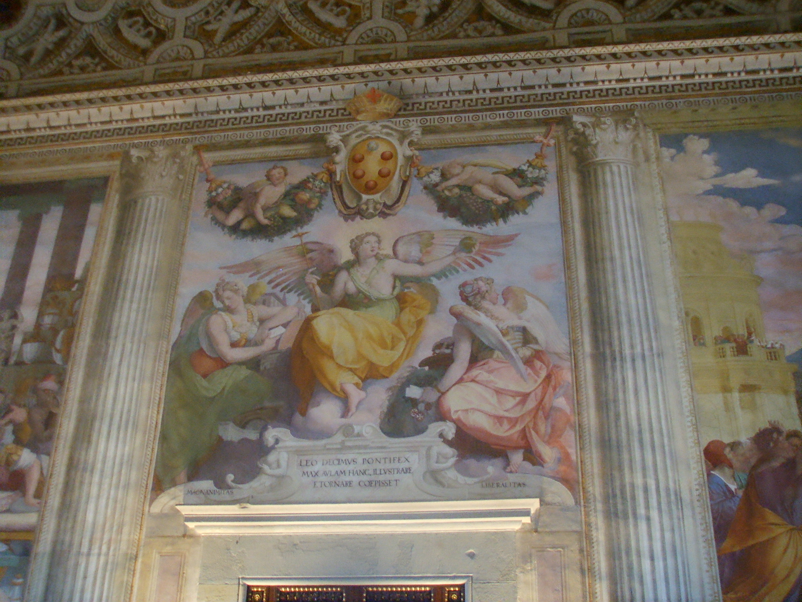 Villa medicea di Poggio a Caiano, inside sala di Leone X Fresco by Alessandro Allori in Poggio a Caiano, Italy